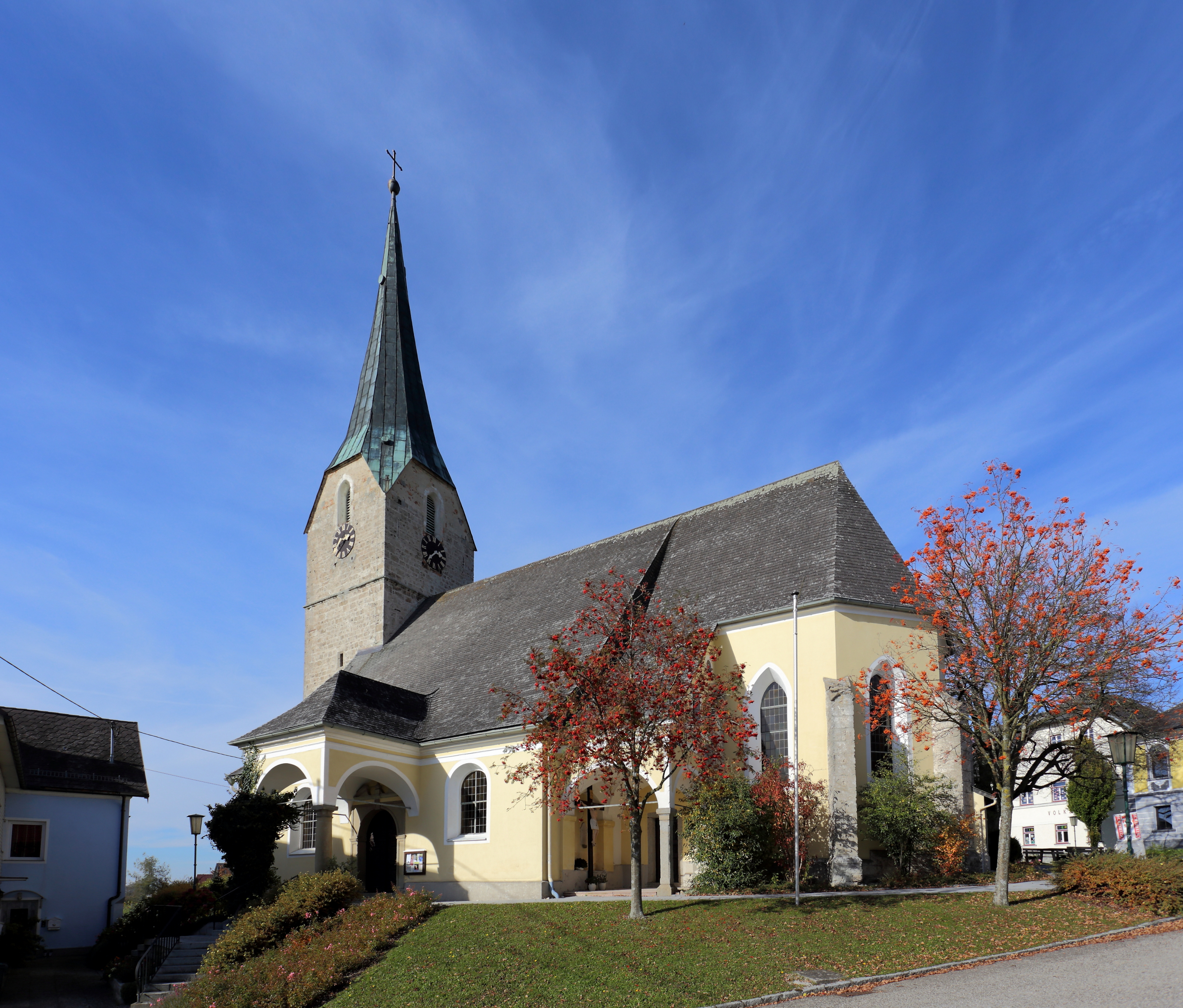 Südostansicht der katholischen Pfarrkirche hl. Dreifaltigkeit in der oberösterreichischen Gemeinde Andrichsfurt. Eine gotische Kirche aus der zweiten Hälfte des 15. Jahrhunderts mit einem einschiffigen, dreijochigen Langhaus und einem zweijochigen Chor. Südseitig wurde in der Mitte des 17. Jahrhundert ein dreijochiges Seitenschiff und Vorbauten auf toskanischen Säulen angebaut.